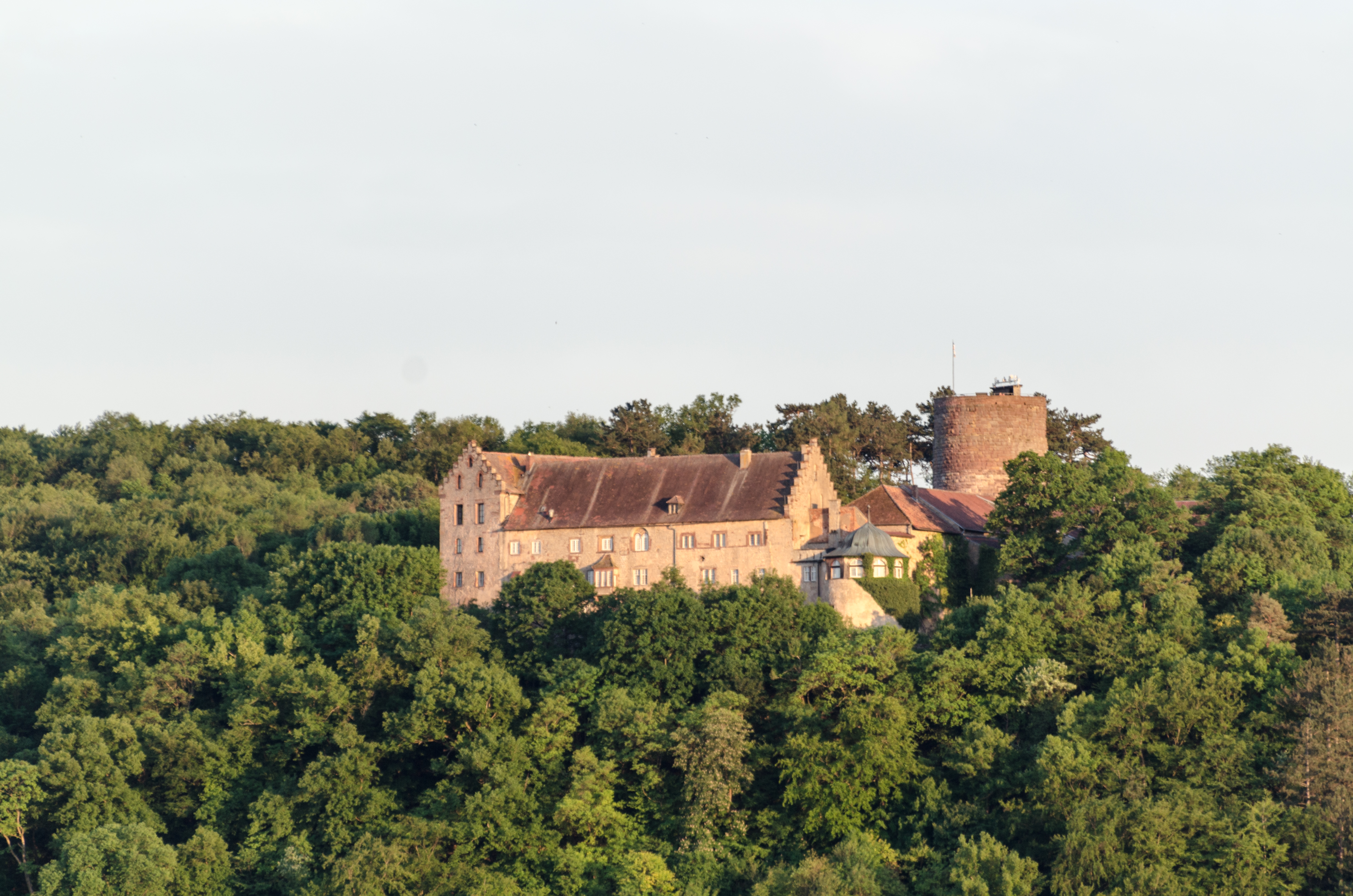 Hammelburg, Burg Saaleck von Norden